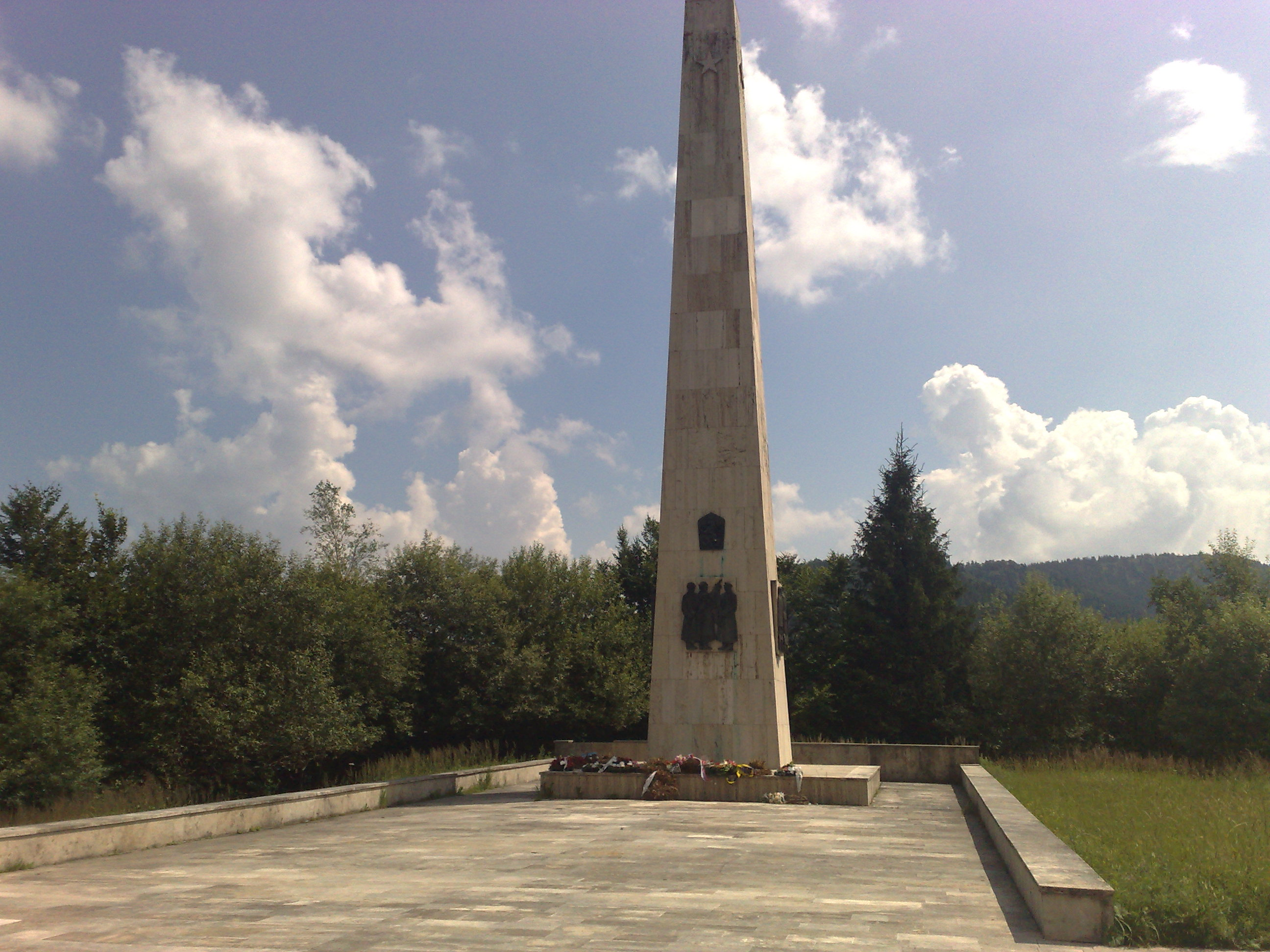 013 24 Strečno, Slovakia